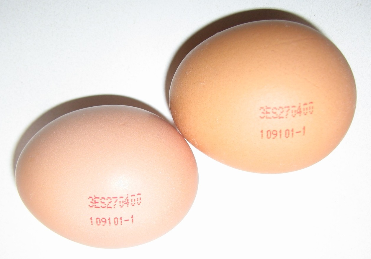 Descrición/Description: Marcado individual dos ovos impresa na casca Orixe/Source: Fotografía propia (self-made) Autor/Author: P. Lameiro Copyright: PD-propia (PD-self) Data/Date: 2.11.2005